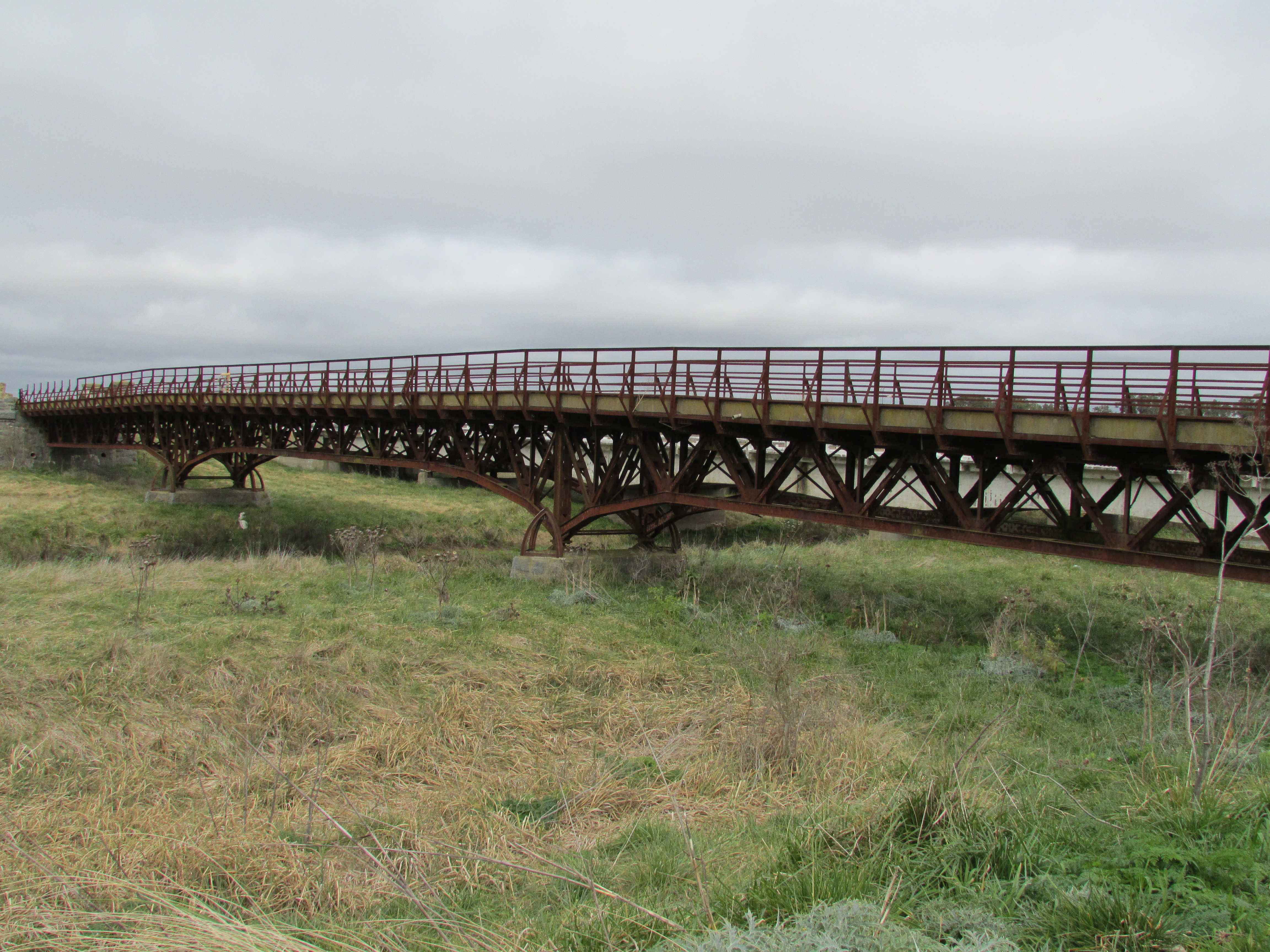 Puente de la ruta 2 sobre el canal 1 desde el noreste en el partido de Dolores, provincia de Buenos Aires, Argentina.